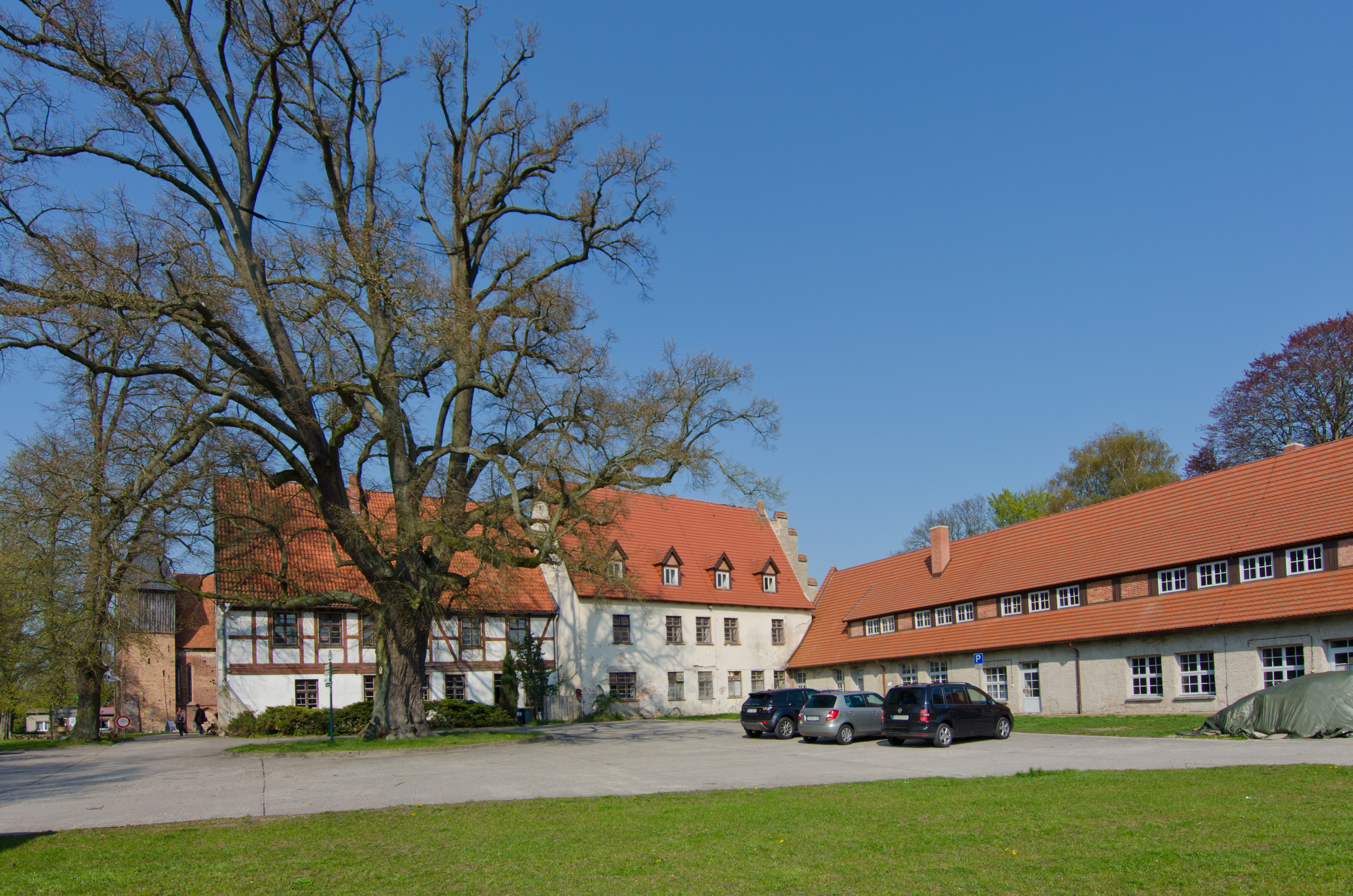 Kloster Rühn